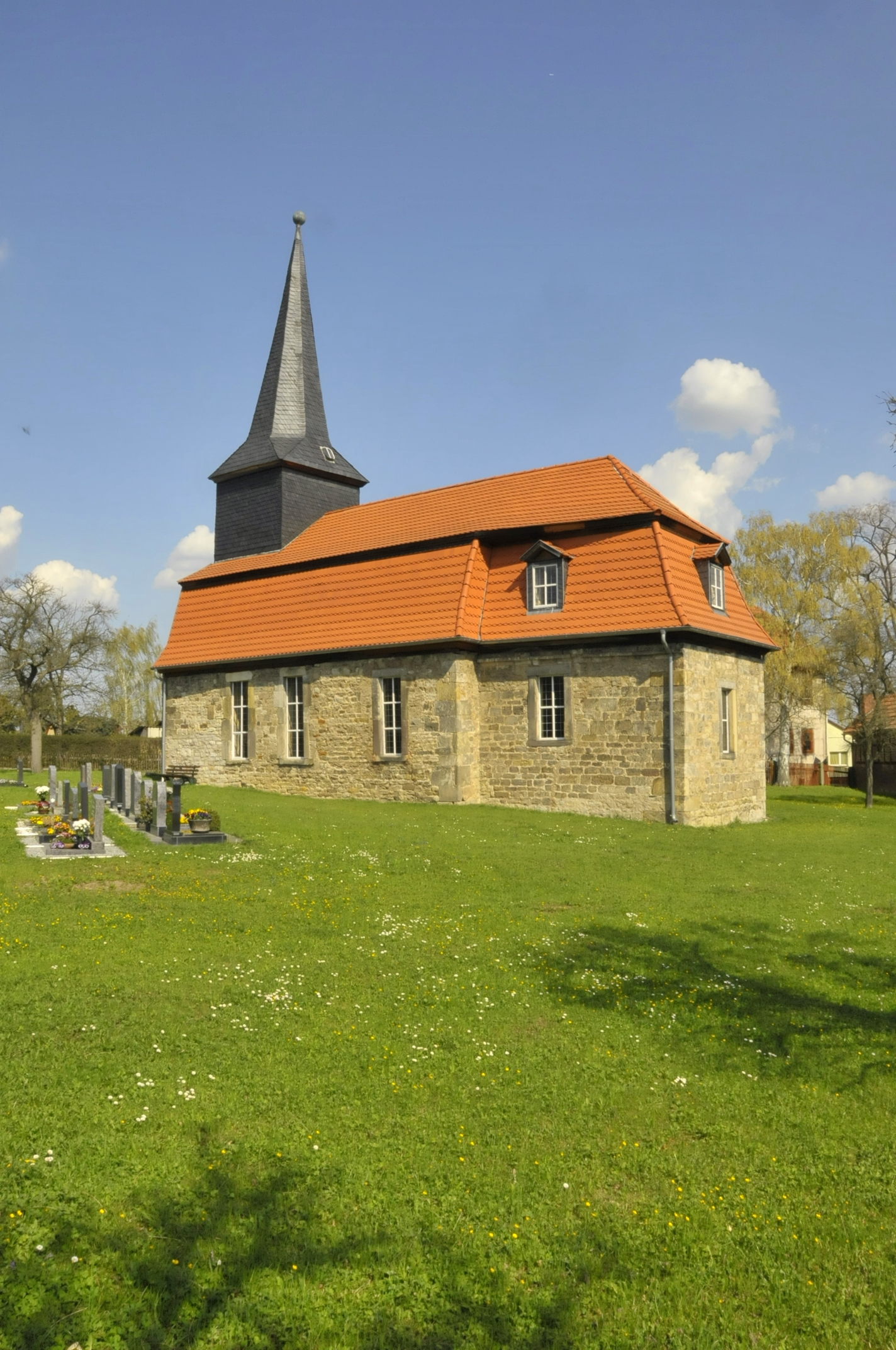 Dorfkirche St. Johannes in Görbitzhausen (Wipfratal)